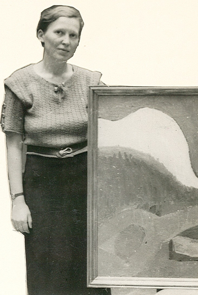 portrett, kvinne, kunstmaler, stående knefigur, maleri.